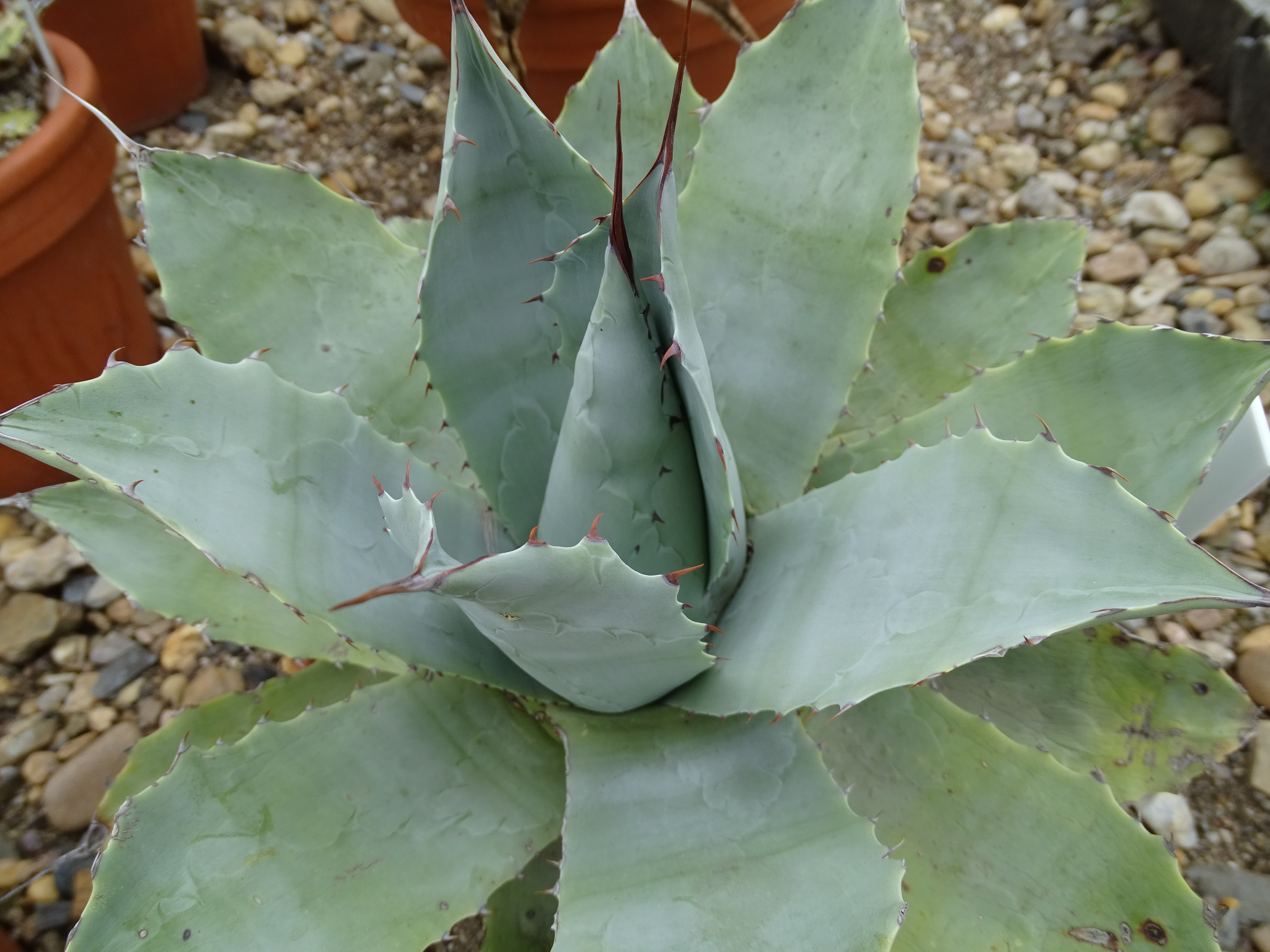 Botanická zahrada Praha